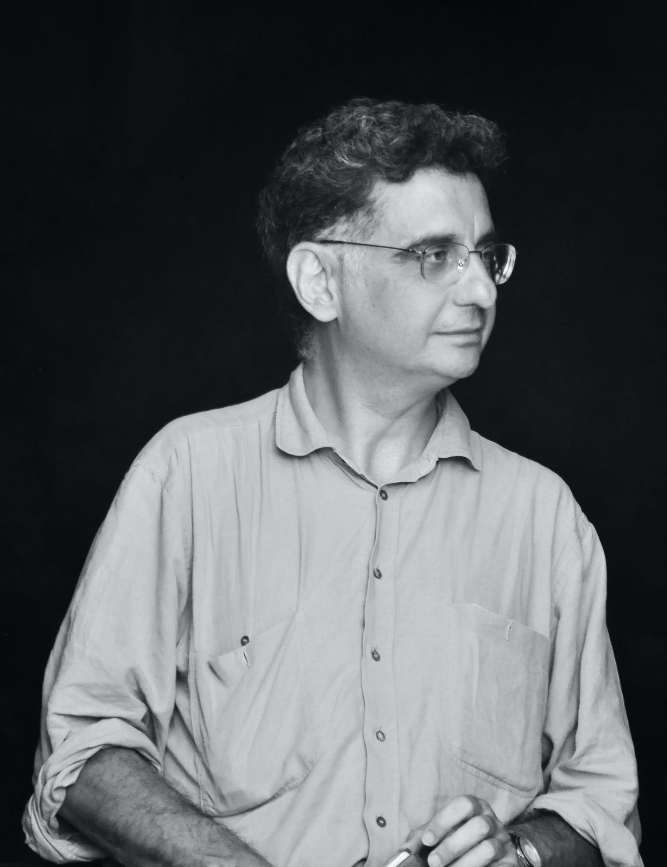 Francesco Calogero sul set de "Nella terra del Padrino